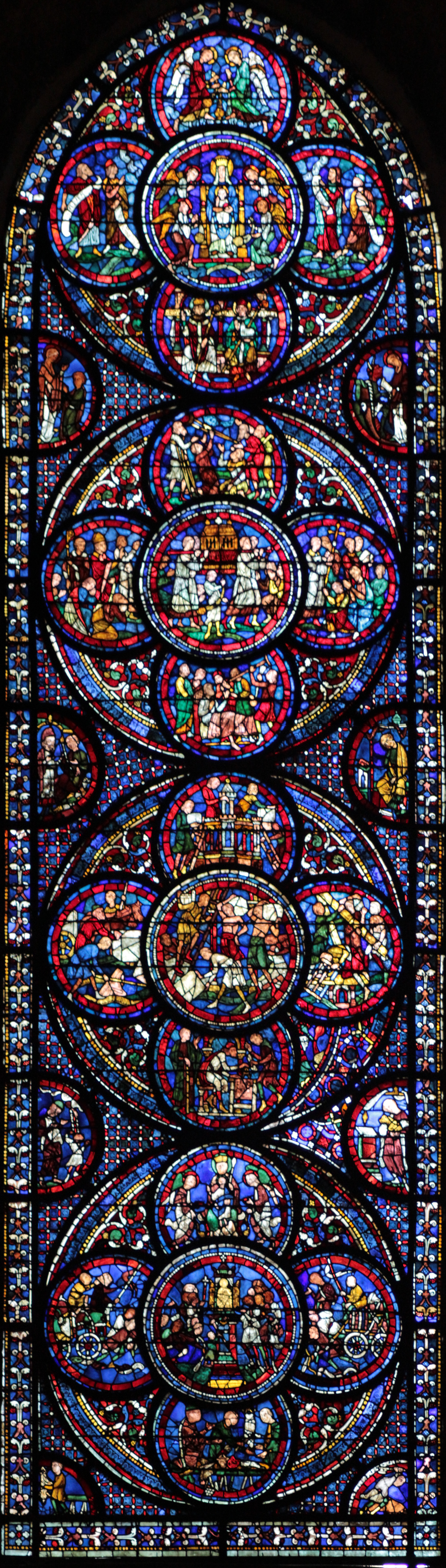 vitrail des miracles de la Vierge, cathédrale Notre-Dame de Chartres, Eure-et-Loir, France.